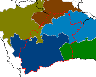 Szeben megye mai határai (piros vonallal) az 1914-es vármegyebeosztás feltüntetésével (világosbarna: Alsó-Fehér vármegye; sötétkék: Szeben vármegye; zöld: Fogaras vármegye; vörös: Kis-Küküllő vármegye; világoskék: Nagy-Küküllő vármegye)